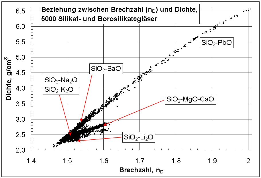 Beziehung zwischen Brechzahl und Dichte für Silikat- und Borosilikatgläser.